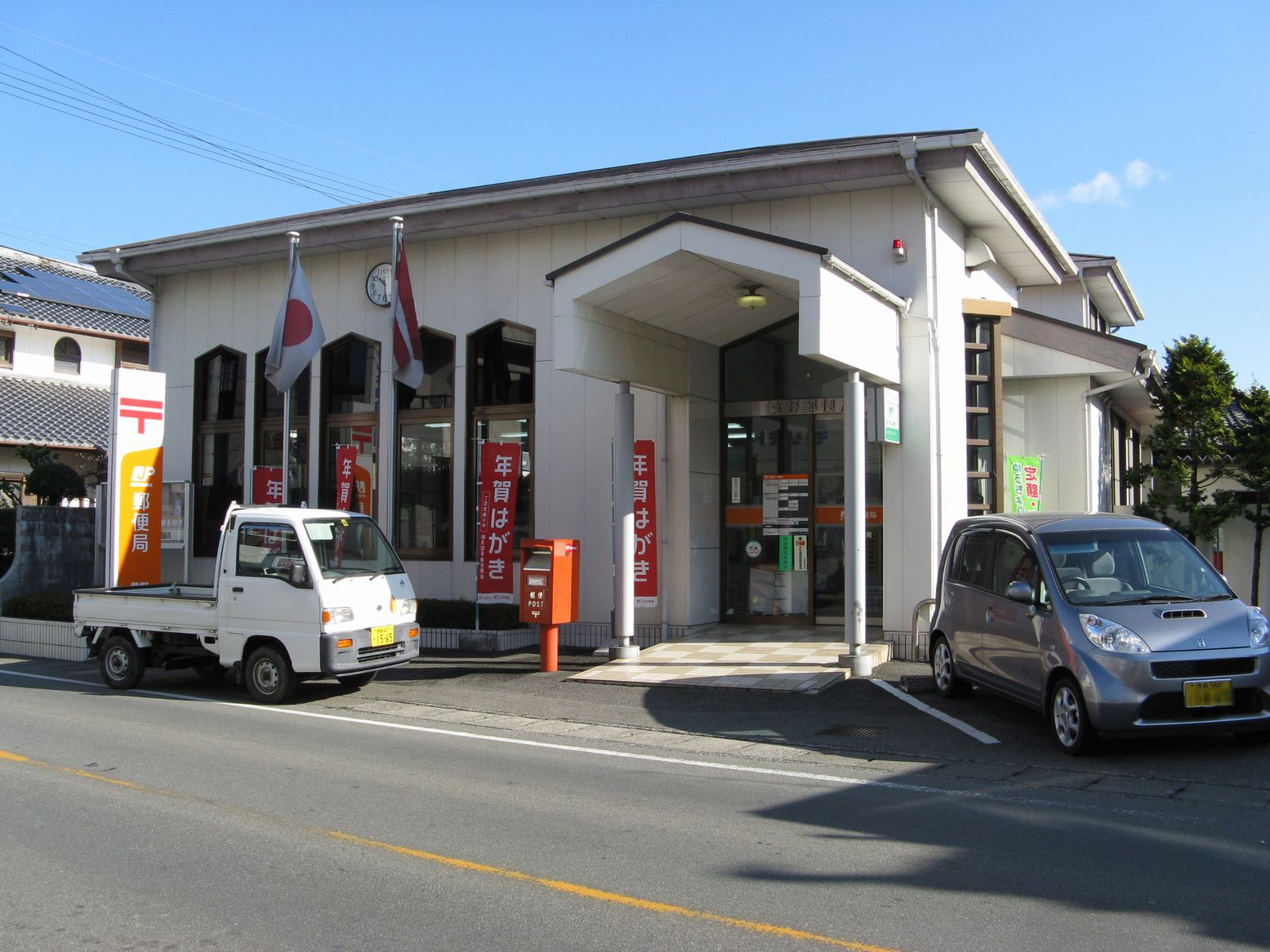 桑野郵便局